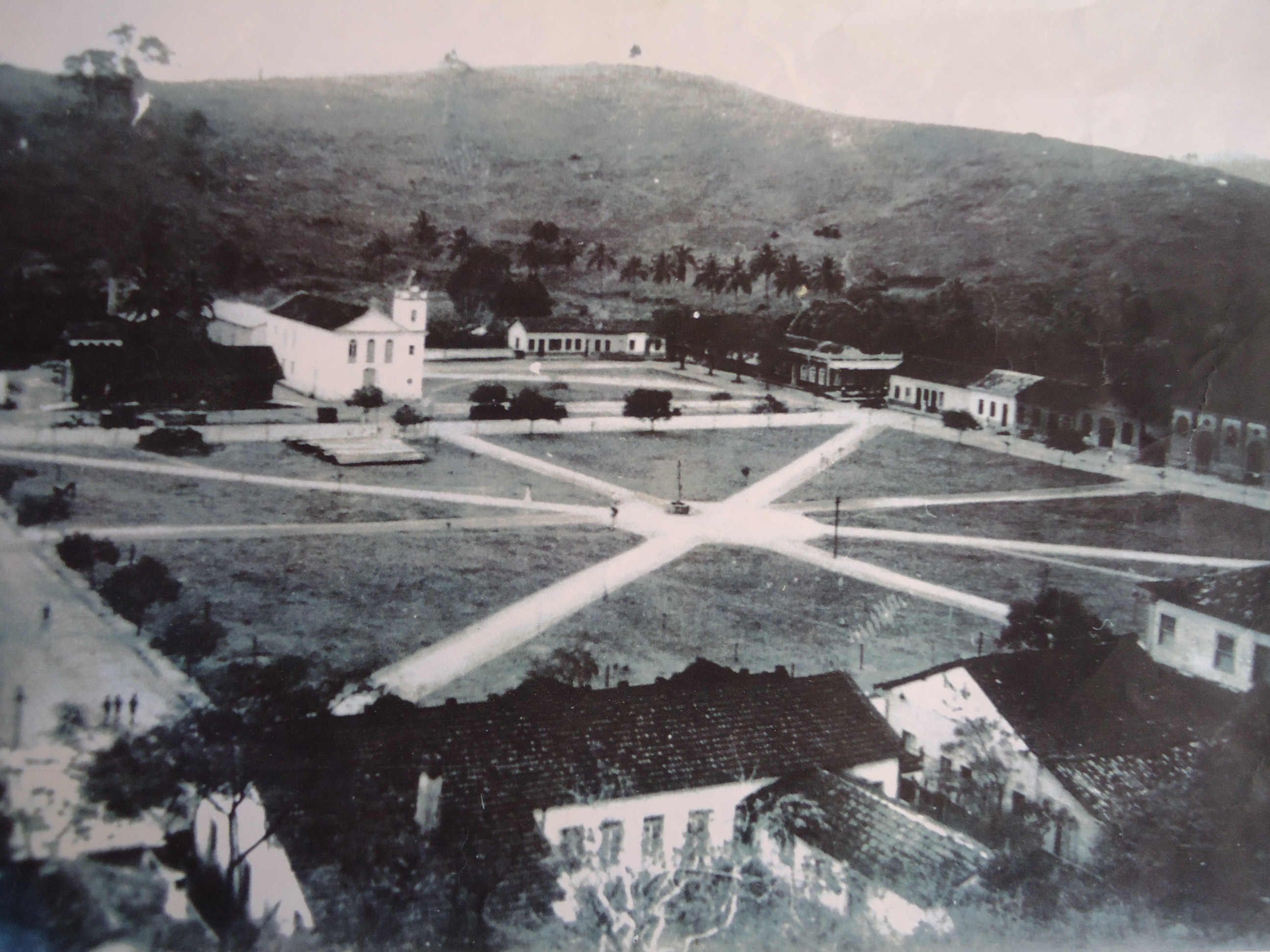 Entre 01 de Maio de 1891 e 29 de Abril de 1892, foi criado, existiu e foi extinto o Município de Macabu. Em homenagem ao dia de sua criação, a principal praça da cidade passou a se chamar 1º de Maio. A fotografia mostra essa praça exatamente como era em 1891, ano em que a foto foi obtida.